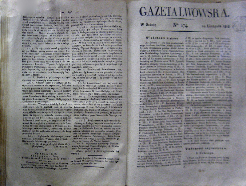 Gazeta Lwowska, a Polish newspaper in 1818